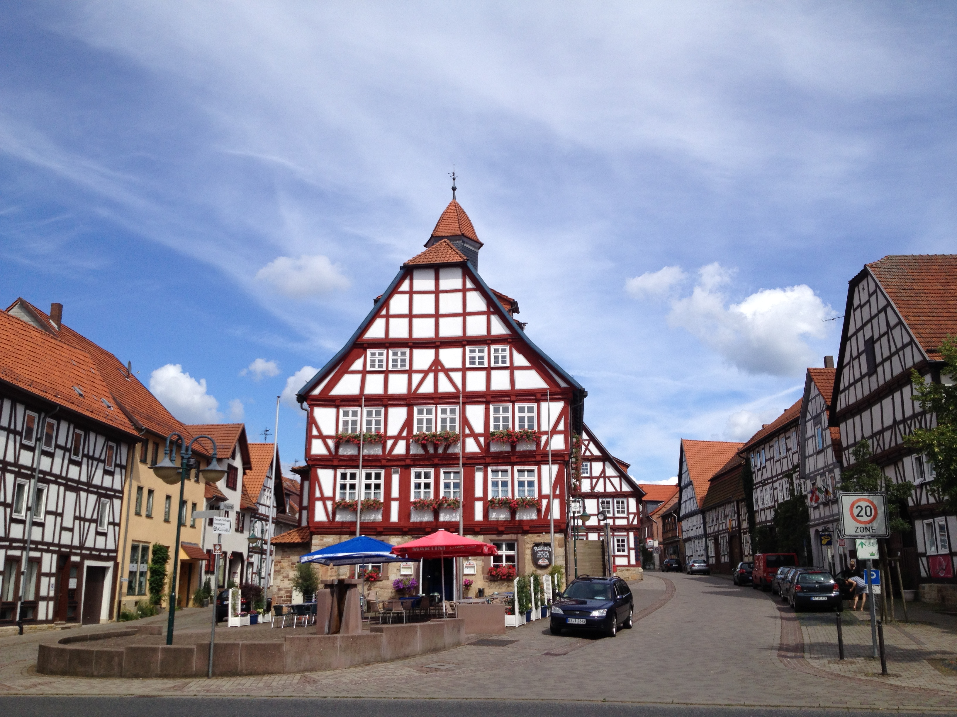 Das Fachwerkrathaus von Immenhausen; im Vordergrund verlaufen der Reinhardswald-Radweg und der Märchenland-Radrundweg